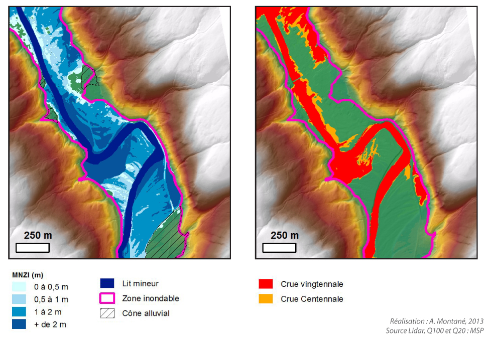 Comparaison entre un MNZI et les crues vingtennales et centennales de la rivière Matane